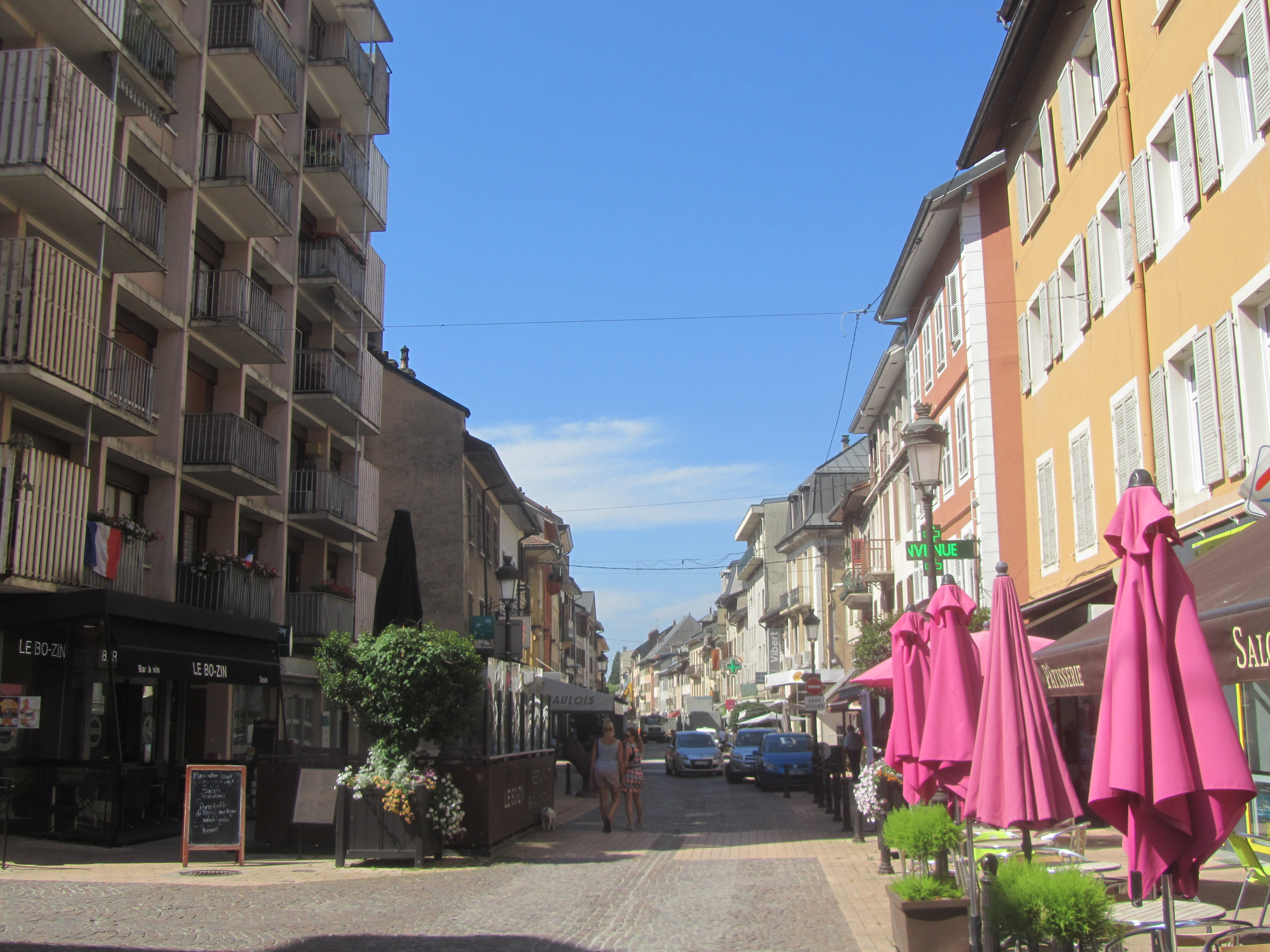 Vue de la République au centre d'Albertville